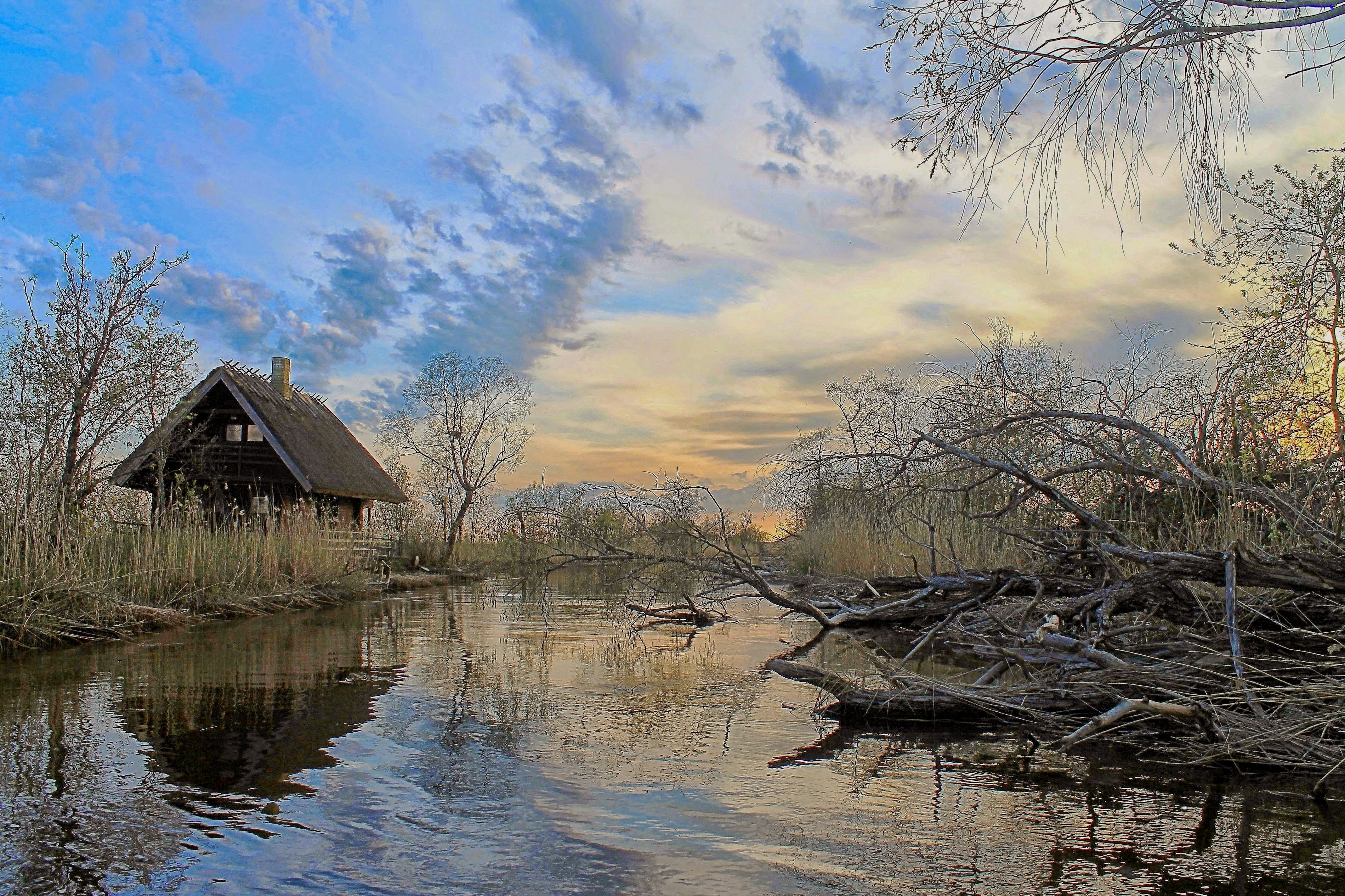 Kasari jõgi, Penijõe välibaas Penijõe suudme juures. Läänemaa, Matsalu looduskaitseala